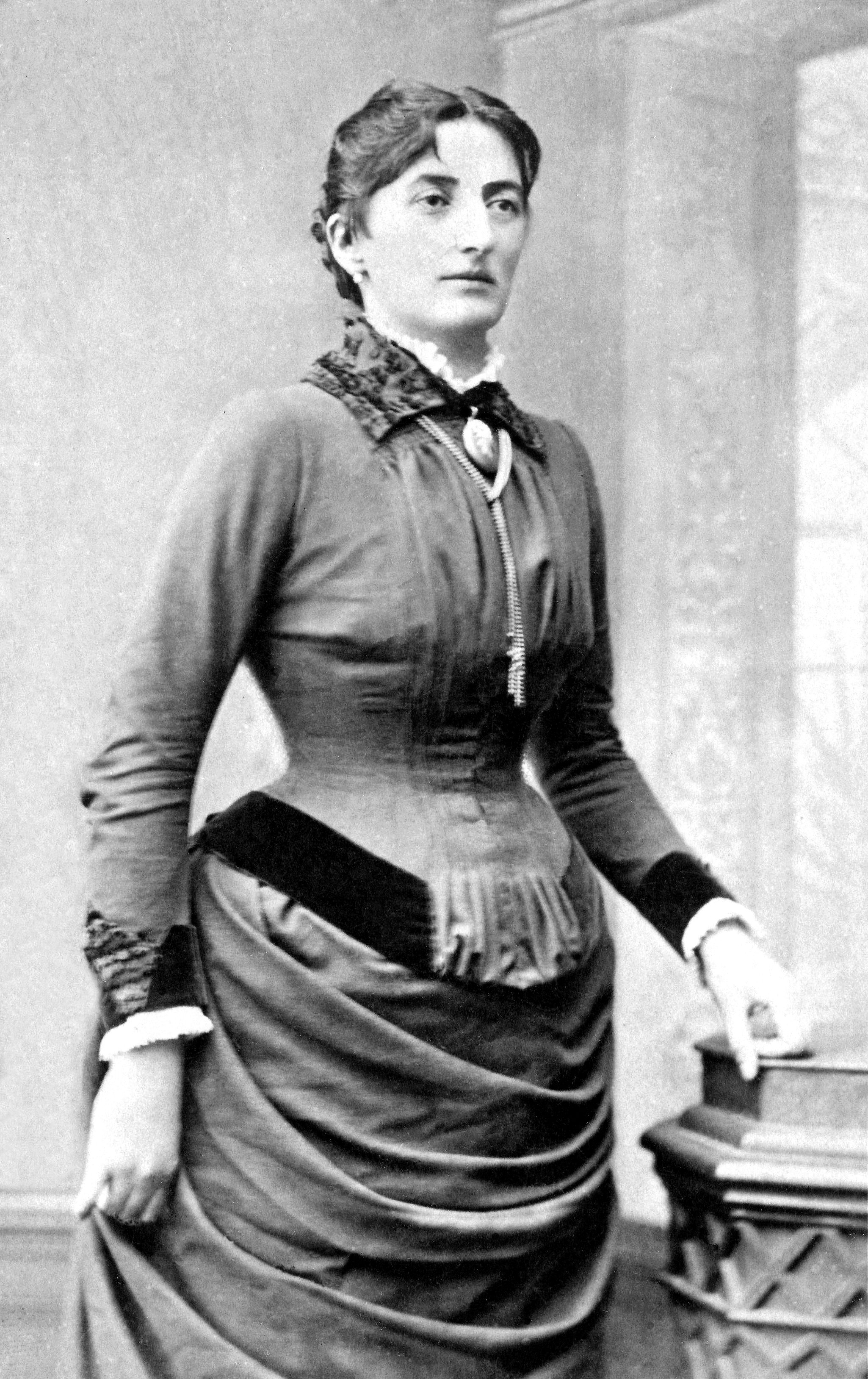 Katharina Baronin Wassilko, geb. von Flondor